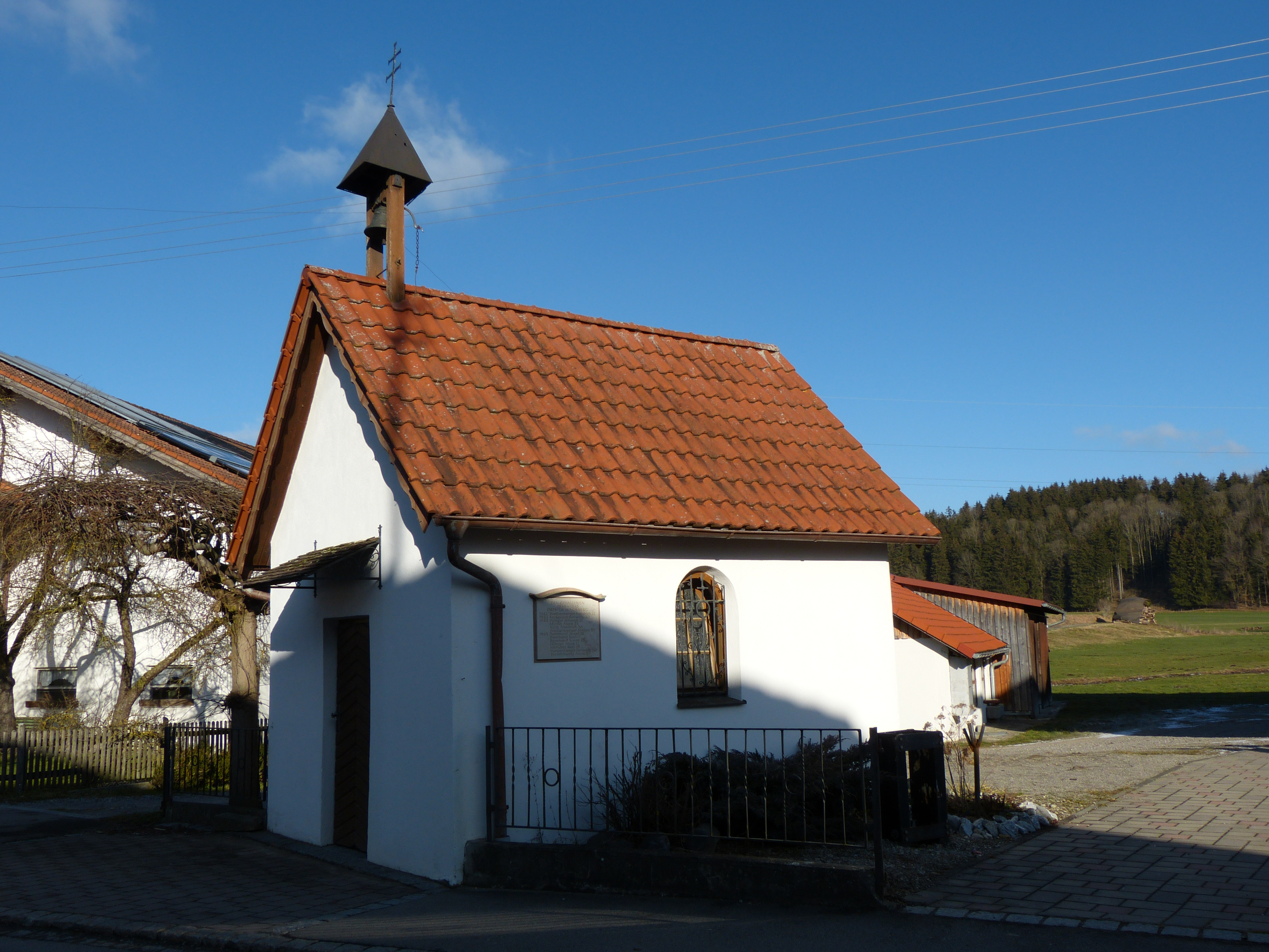 Kapelle in Wagsberg, Landkreis Unterallgäu, Bayern